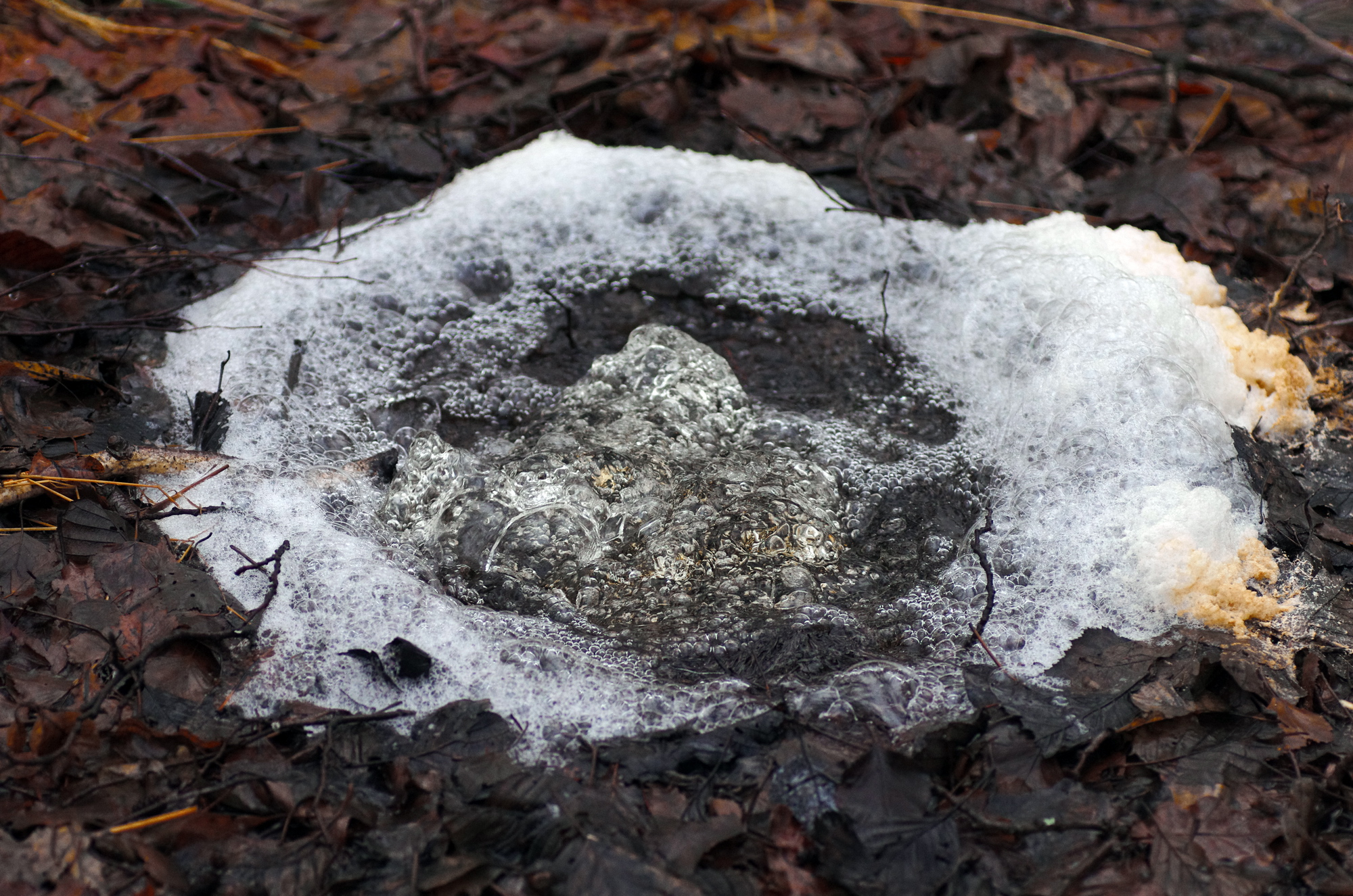 Mofety Bublák u Vackovce, okres Cheb